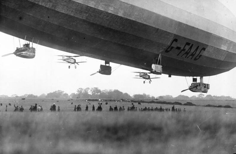 Zur kommenden grossen Abrüstungs-Conferenz am 2. Februar! Werden sie das nun wirklich abrüsten? Der Zeppelin als Flugzeugmutterschiff, die modernste Luft- [?] sche Kampfflugzeuge am Rumpf des Marineluftschiffes R 33. Die Flugzeuge werden am Rumpf des Luftschiffes hängend während des Fluges mitgeführt und können zu jeder Zeit starten.